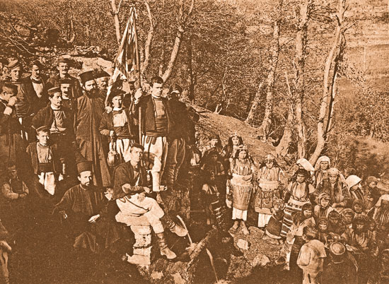 Завеждане на булката на чешмата в село Битуша, 1908.